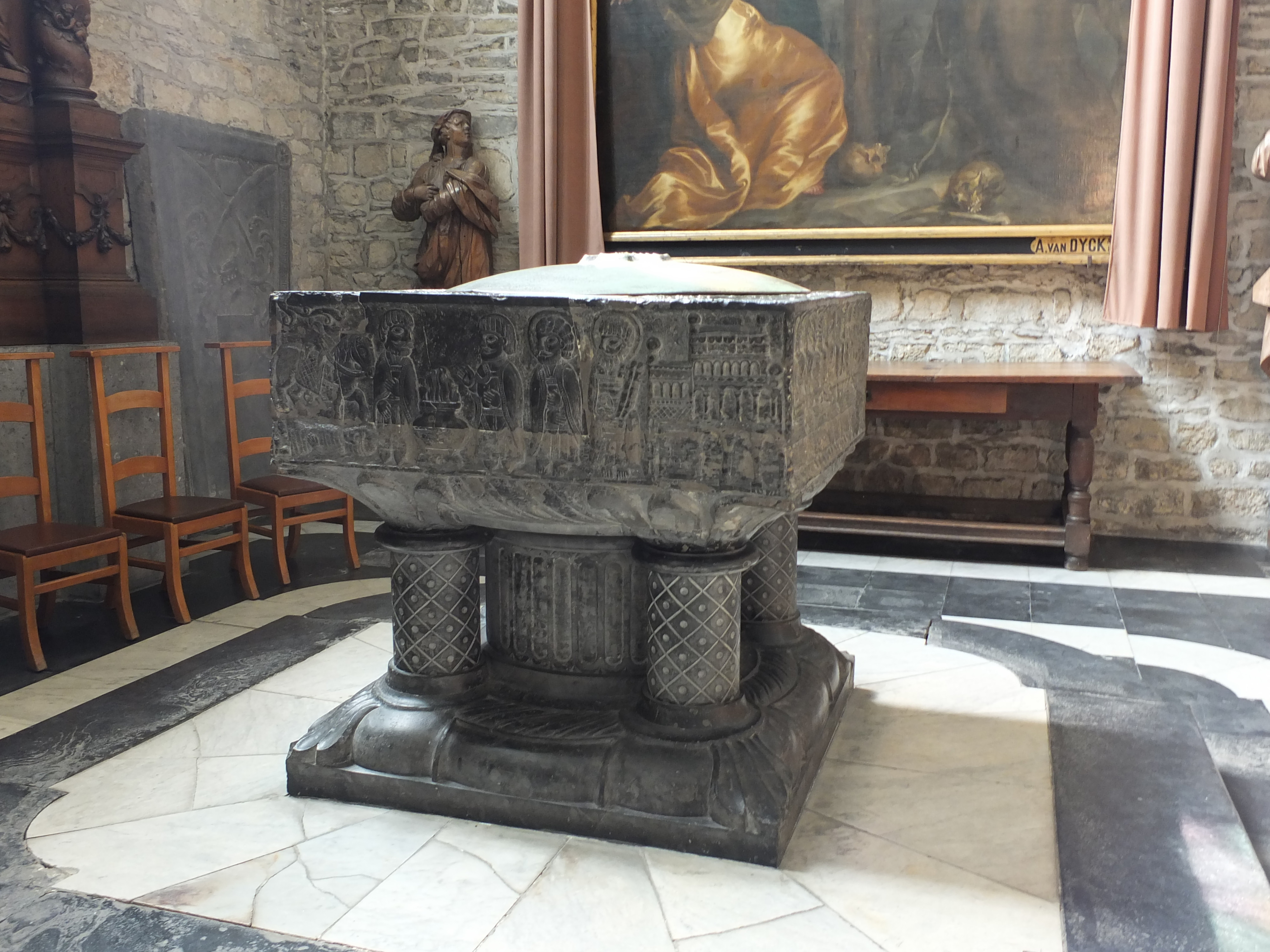 De elfde eeuwse Romaanse doopvont in Doornikse kalksteen in Onze-Lieve-Vrouwekerk van Dendermonde is het oudste kunstwerk van de kerk. Op de zijvlakken staan symbolische voorstellingen in verband met het doopsel. Twee friezen stellen de belangrijkste momenten voor uit het leven van de apostel Paulus: zijn bekering en zijn opname in de gemeenschap van de apostelen, gerestaureerd in 1858-1860 door J.B. De Pauw (Dendermonde) naar plan van architect L. Roelandt (Gent) met toevoeging van voetstuk; deksel met beeldengroep "doopsel van Christus" van 1862, hout en koper; witte marmeren wijwatervaten door beeldhouwer Walter Pompe (Antwerpen), 1774.